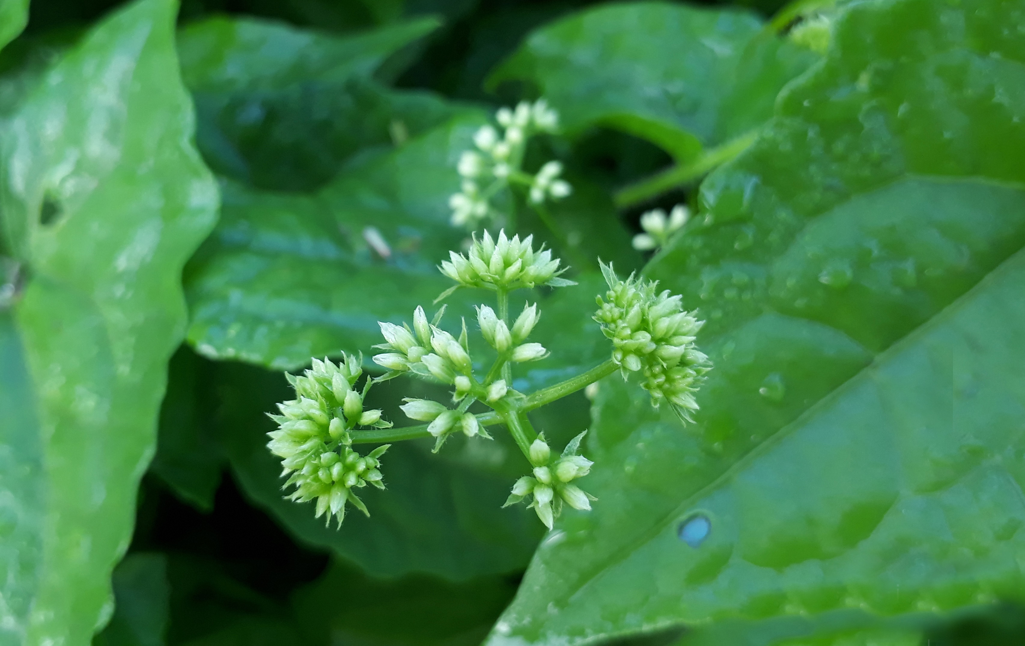 முல்லை பூ